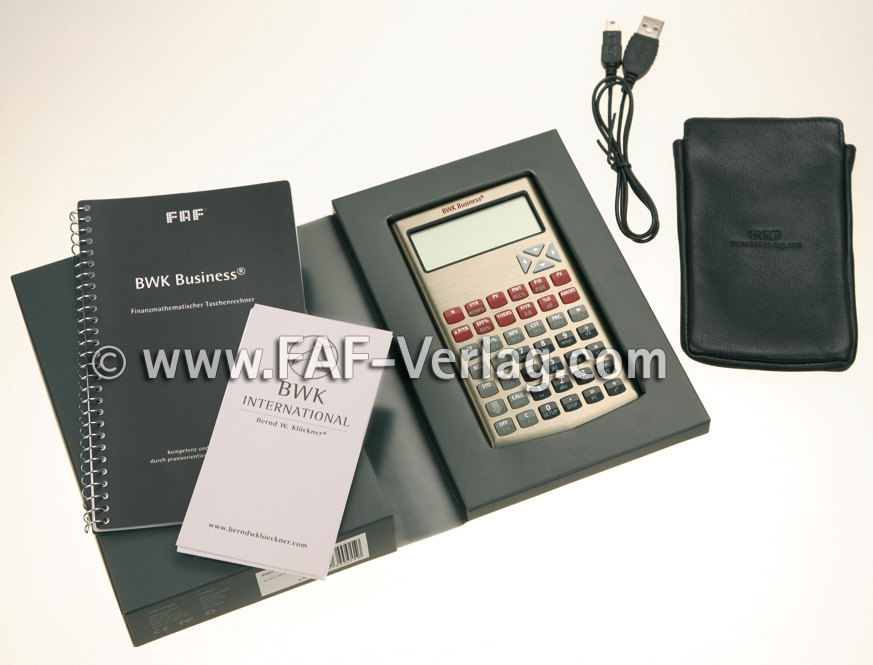 BWK Business - gesamt